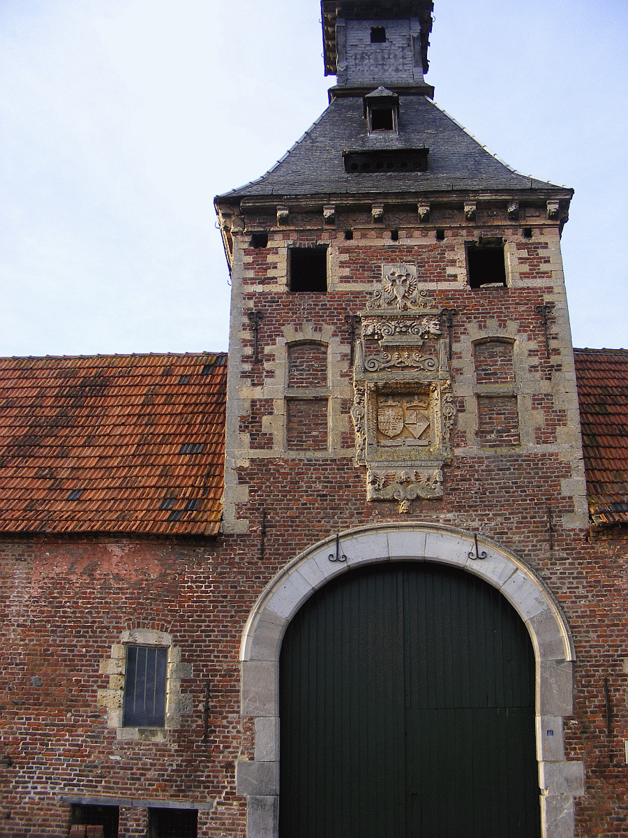 Kasteelhoeve Dessener Wintershoven-Kortessem